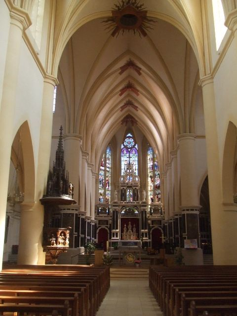 Abbatiale Saint-Pierre, Remiremont, Vosges, France